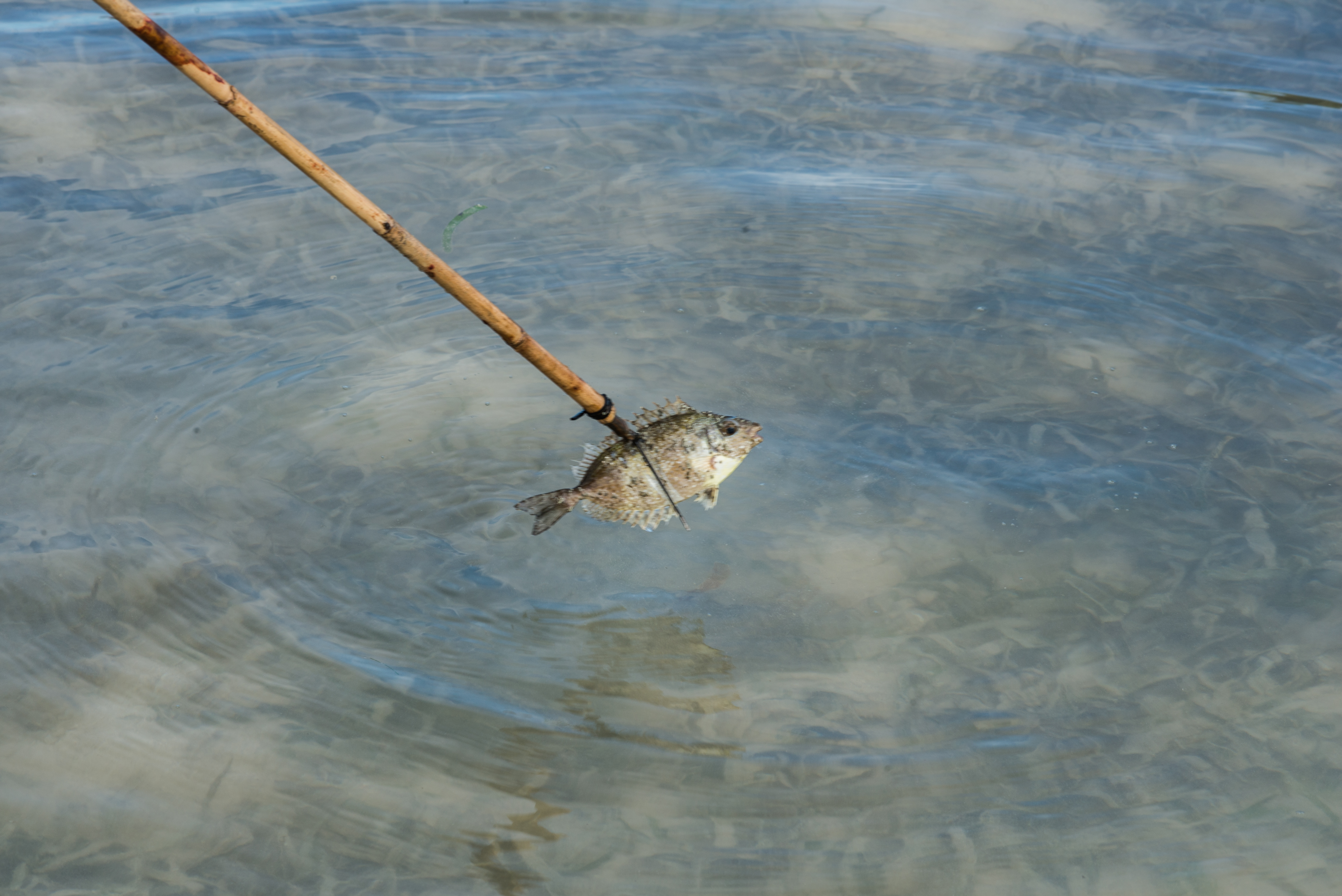 Snap mor